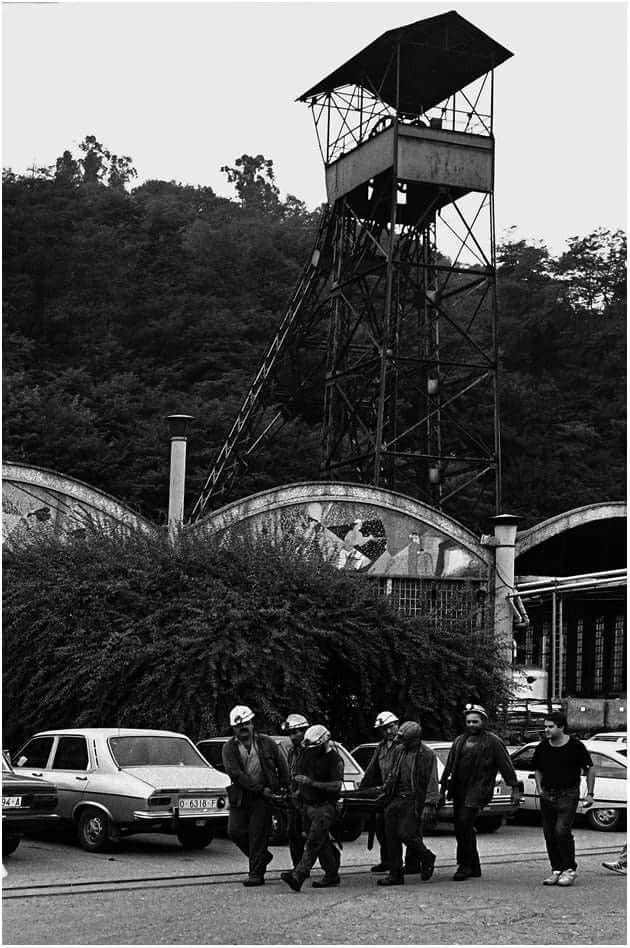 Un grupo de mineros trasladan a un herido en las inmediaciones del pozo Fondón en Langreo (España)